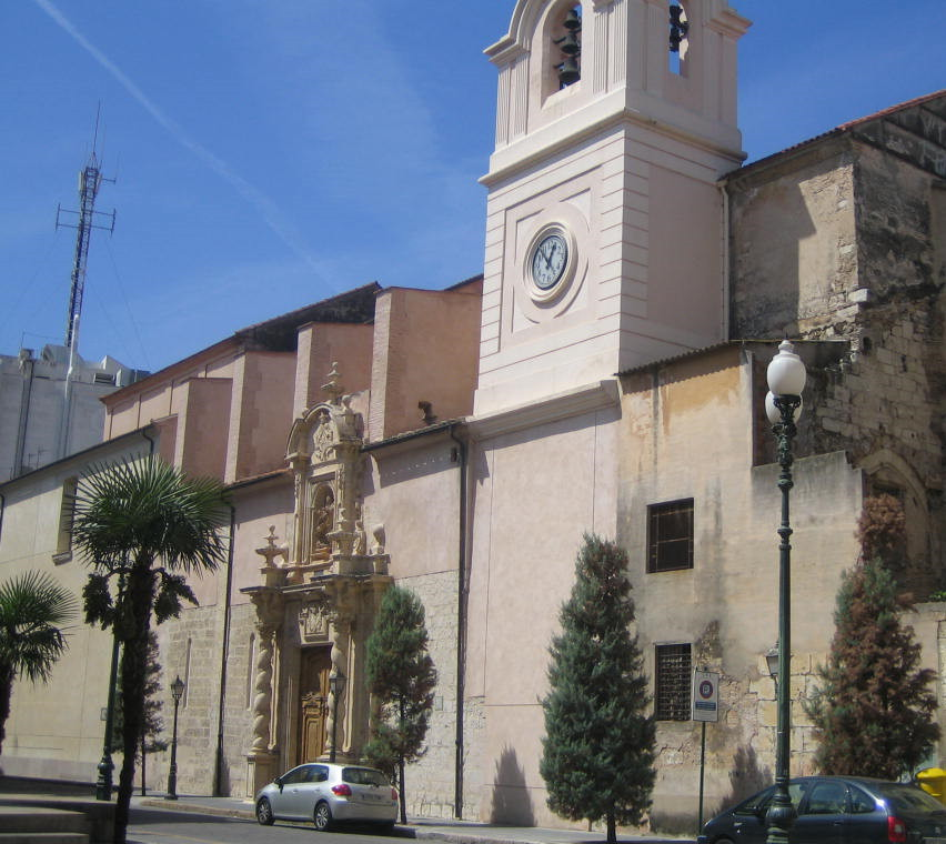 Iglesia Arciprestal de Santa Catalina Vírgen y Mártir. Alzira (España).